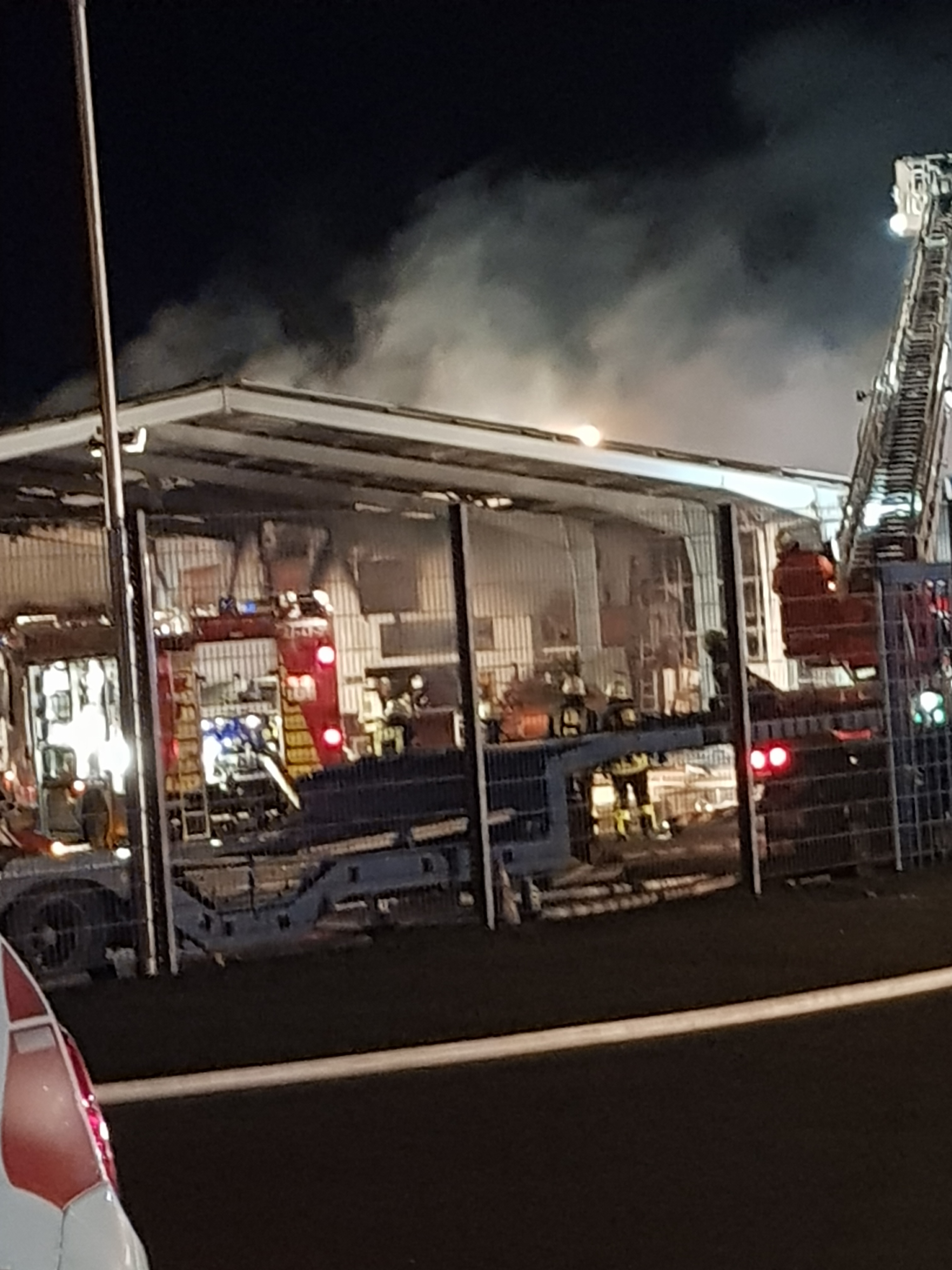 Dies ist das ehmalige Hauptgebäude von Alga in Sittensen